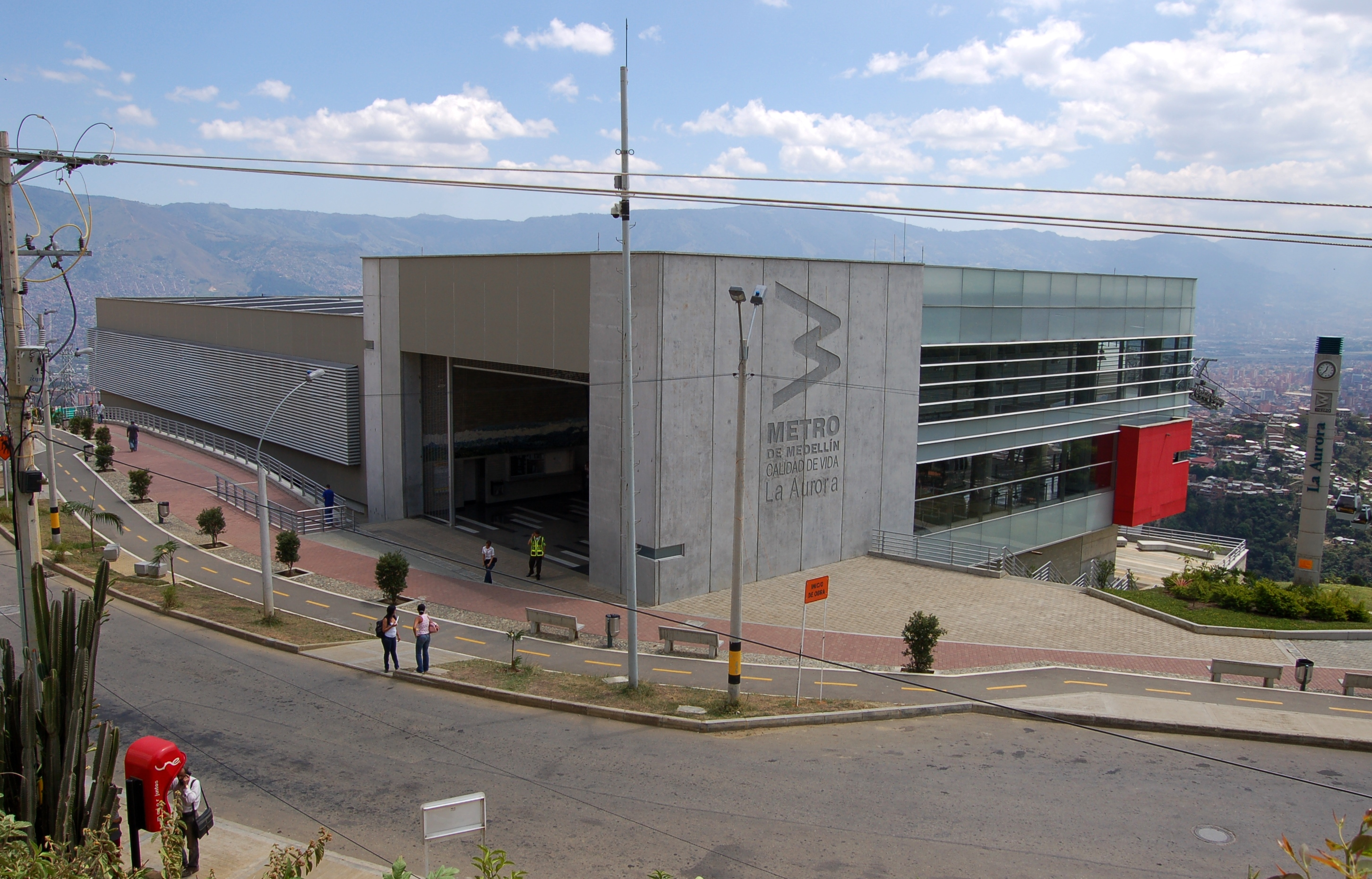 Exterior de la Estación La Aurora, Metro de Medellín.